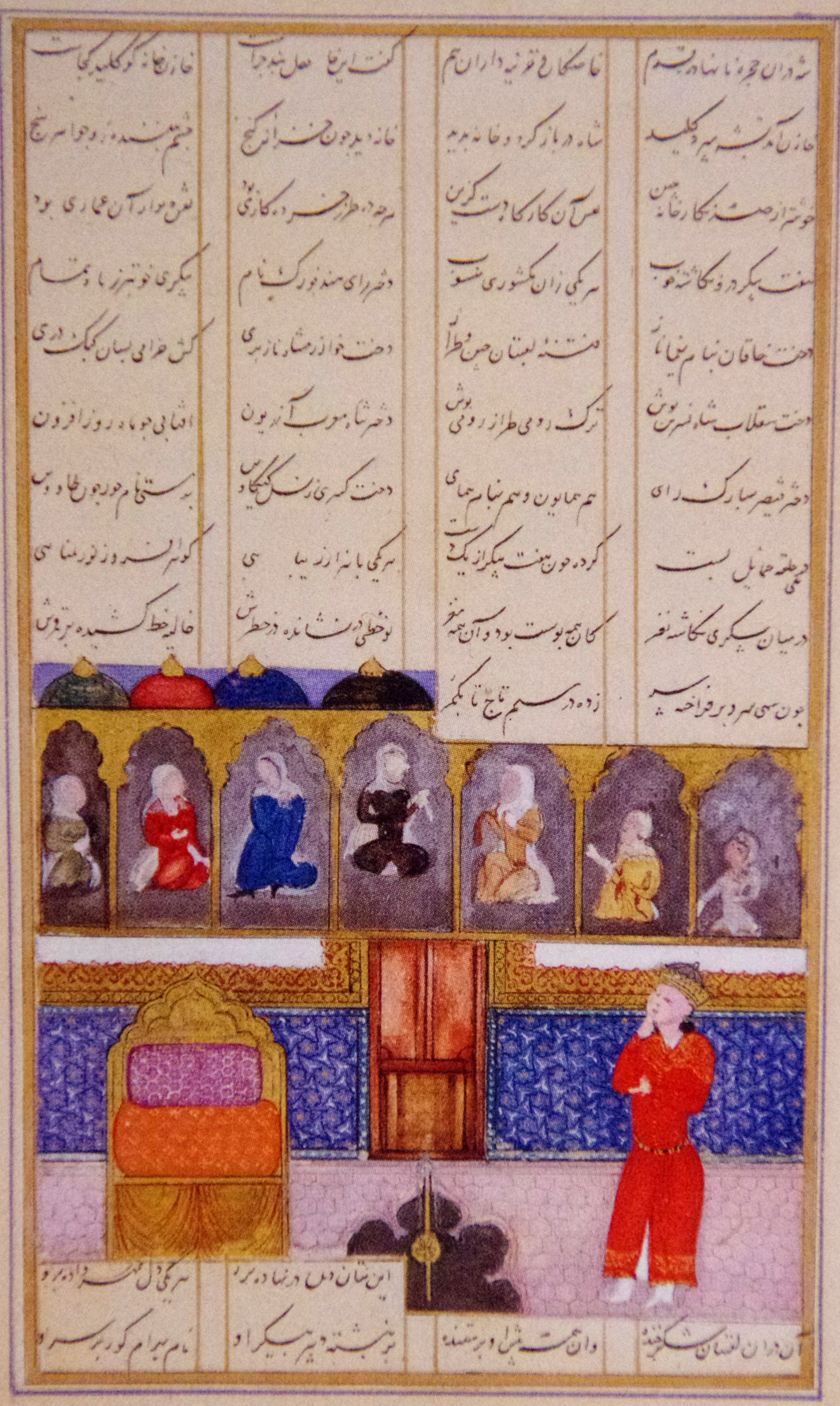 Bəhramın yeddi gözəlin rəsmlərinə baxarkən, Nizami Gəncəvinin Xəmsəsindən "Yeddi Gözəl" poemasına çəkilmiş minyatür, Behzad məktəbi, 1479, eni 11 sm, hündürlüyü 18,5 sm, Nizami Gəncəvi adına Milli Azərbaycan Ədəbiyyatı Muzeyi, Bakı, Nr. 1161/N